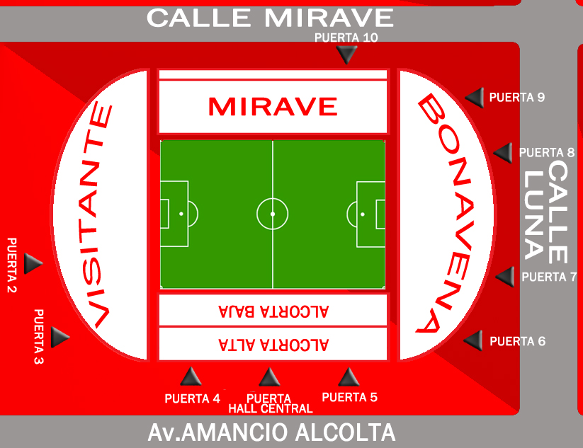 Accesos Duco al Estadio Tomás Adolfo Ducó.